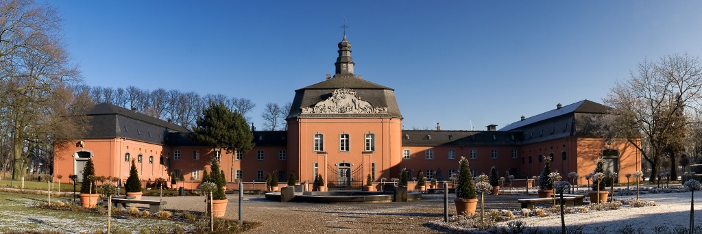 Schloss Wickrath Ostflügel